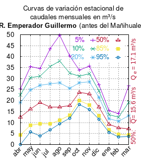 Curvas de variación estacional del río Emperador Guillermo antes de confluencia con el río Mañihuales. # Dirección General de Aguas # Diagnóstico y clasificación de los cursos y cuerpos de agua según objetivos de calidad. Cuenca del río Aysén. # Santiago de Chile # Ministerio de Obras Públicas (Chile) # 2004 # url: # urlarchivo: # Tabla 4.2: Estación Emperador Guillermo antes de junta con Mañihuales, pág. 49 mes 5% 10% 20% 50% 85% 95% abr 25.30 22.48 19.06 12.52 4.48 0.00 may 35.38 30.31 24.84 16.23 8.72 5.70 jun 34.54 31.15 27.04 19.19 9.52 3.84 jul 43.59 35.47 27.63 17.14 9.52 6.74 ago 49.84 38.06 28.06 17.07 11.12 9.48 sep 40.39 32.42 25.53 17.74 13.34 12.08 oct 33.81 31.05 28.18 23.83 19.97 18.22 nov 35.67 32.16 28.50 22.96 18.05 15.82 dic 27.22 24.42 21.50 17.10 13.19 11.41 ene 15.41 13.67 11.86 9.12 6.69 5.58 feb 14.09 12.43 10.58 7.56 4.71 3.44 mar 26.80 19.19 13.14 7.11 4.30 3.63 This plot was created with Gnuplot.